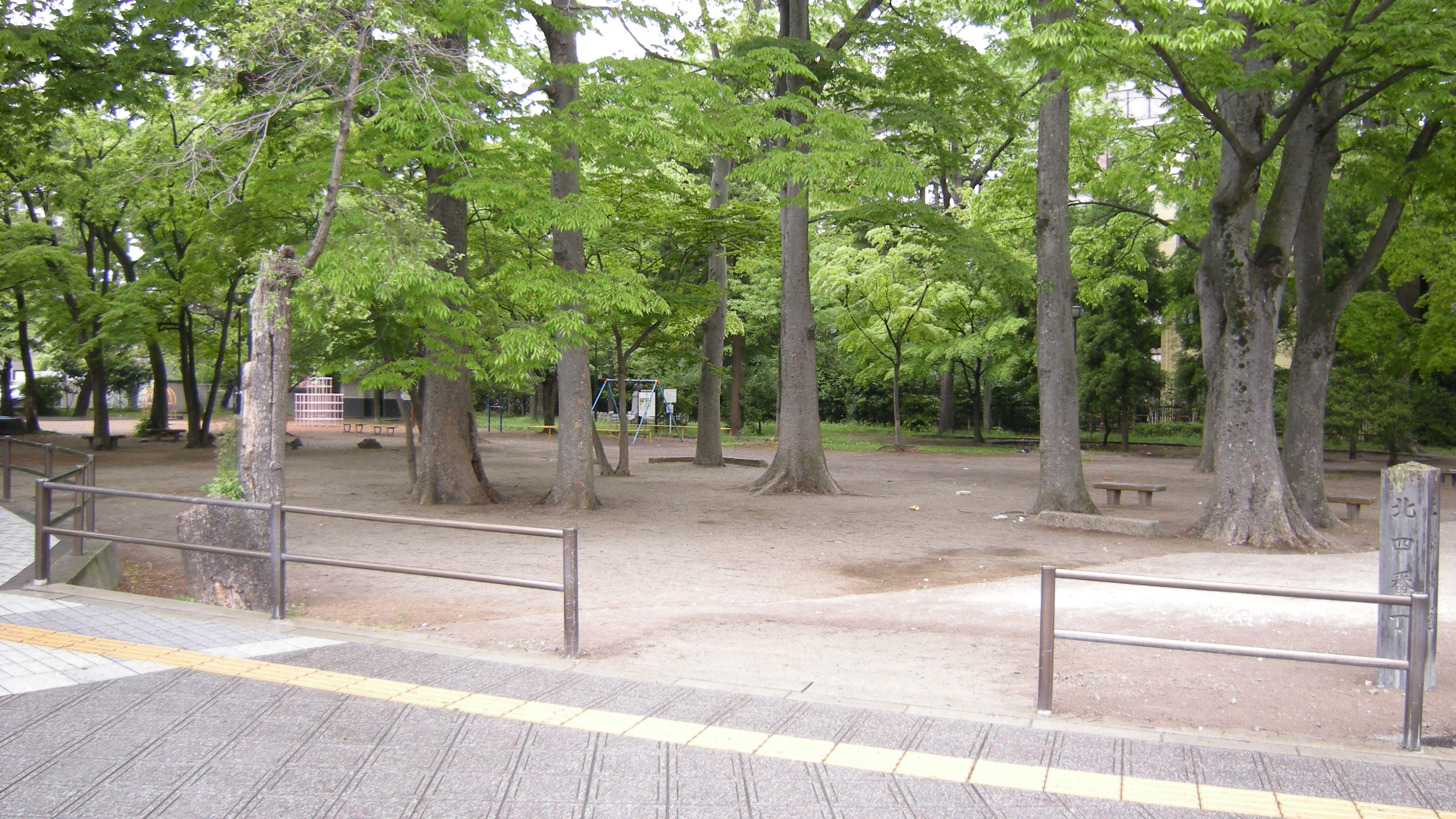 宮城県仙台市青葉区の勝山公園の南東角。北四番丁と愛宕上杉通りの交差点の歩道より、北西に向いて撮影。